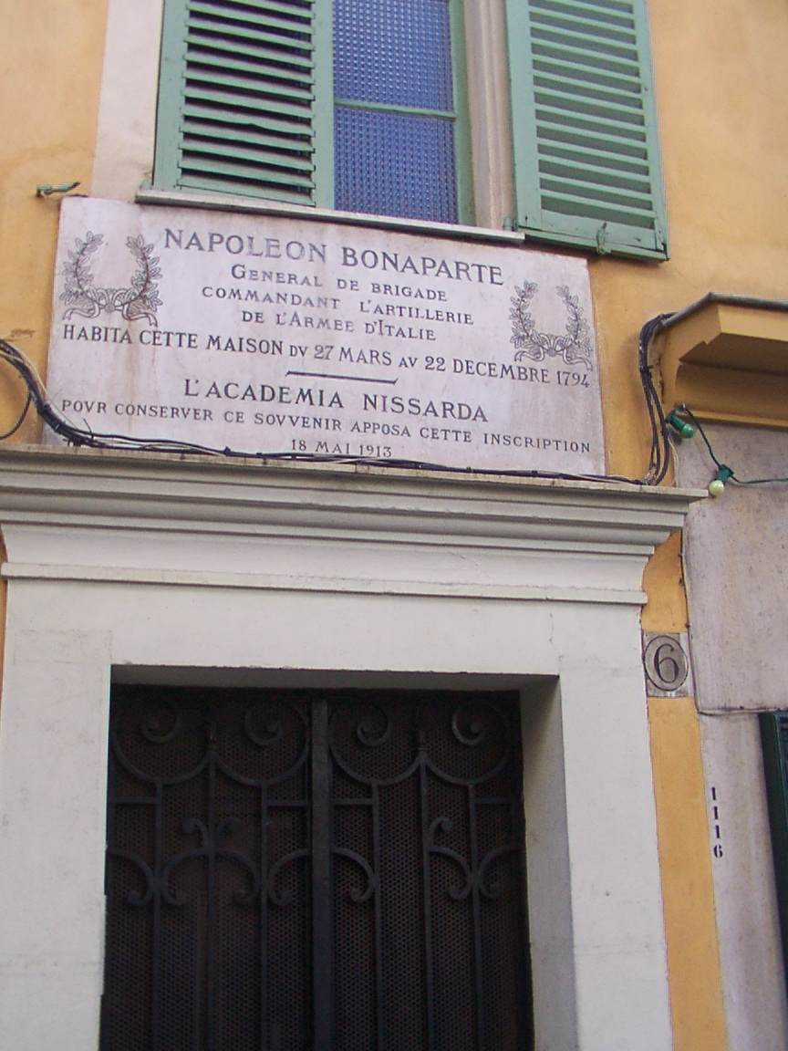 Rue Bonaparte. Plaque indiquant où séjourna le général Bonaparte avant sa campagne d'Italie.